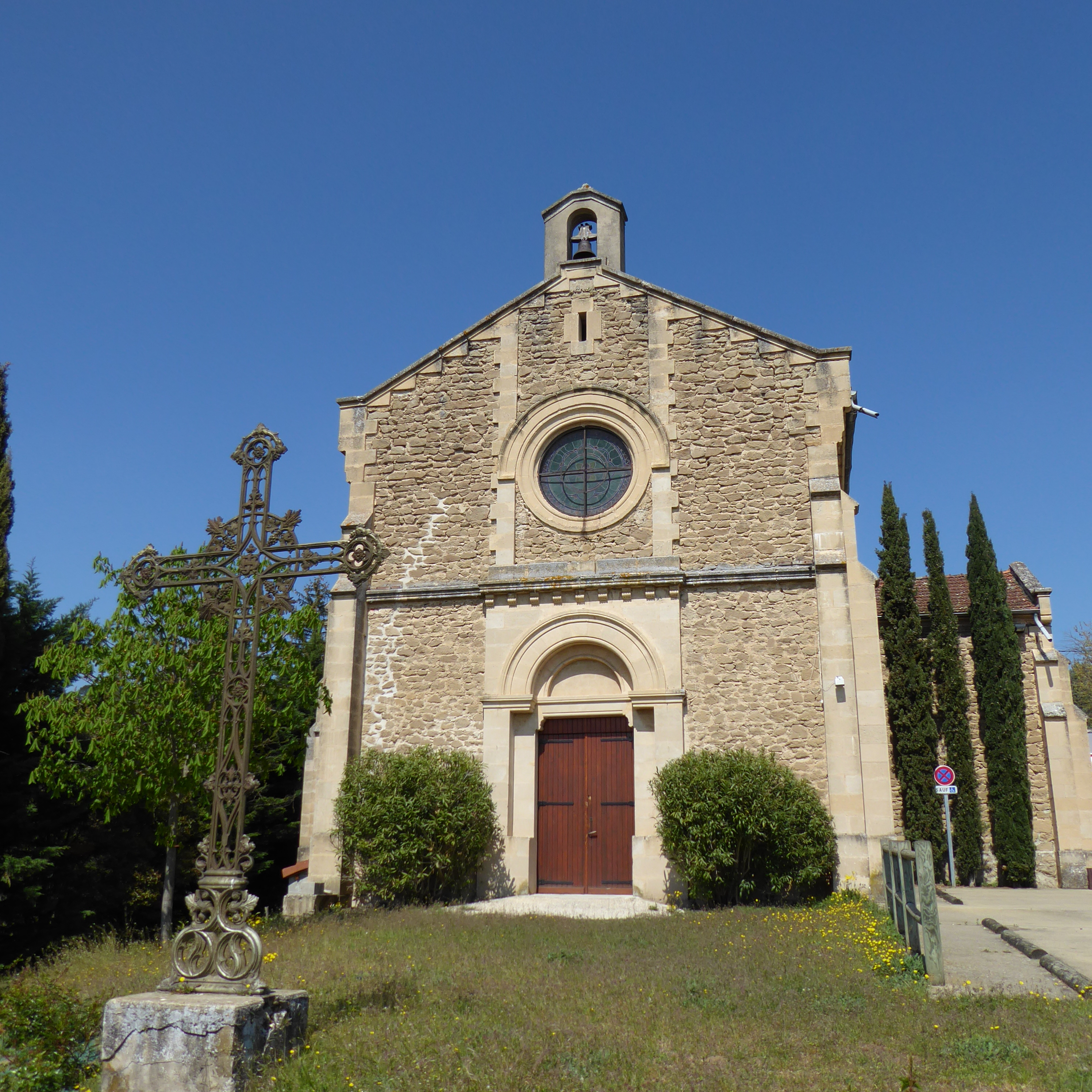 L'église, avec une croix